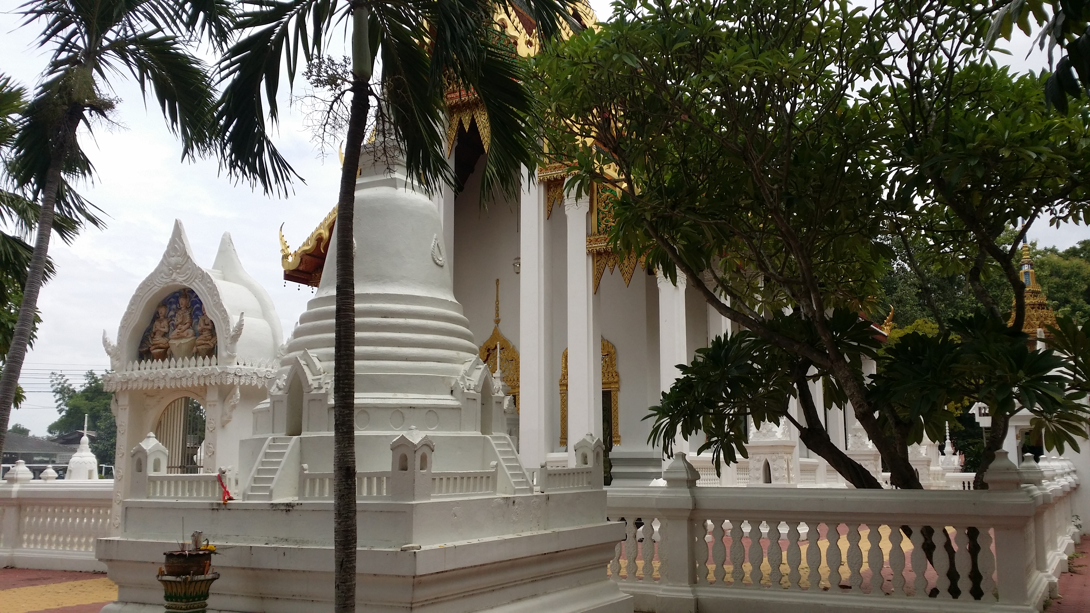 อุโบสถวัดรางวาลย์